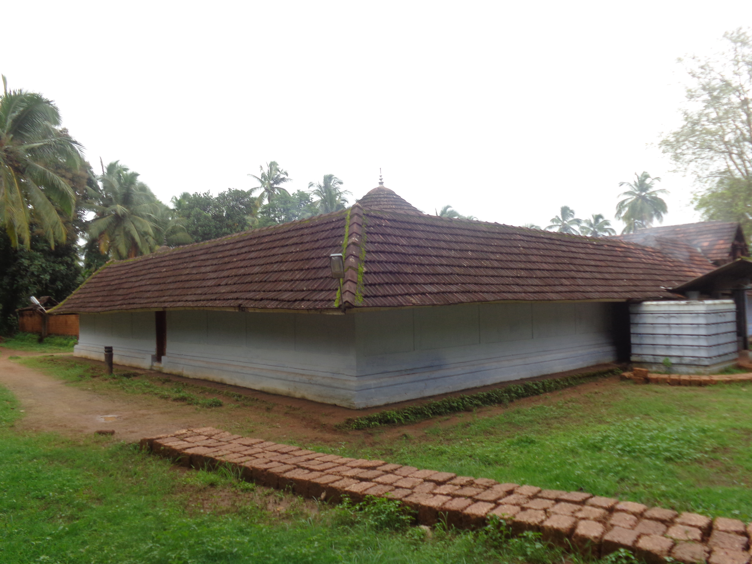 ramapuram temple